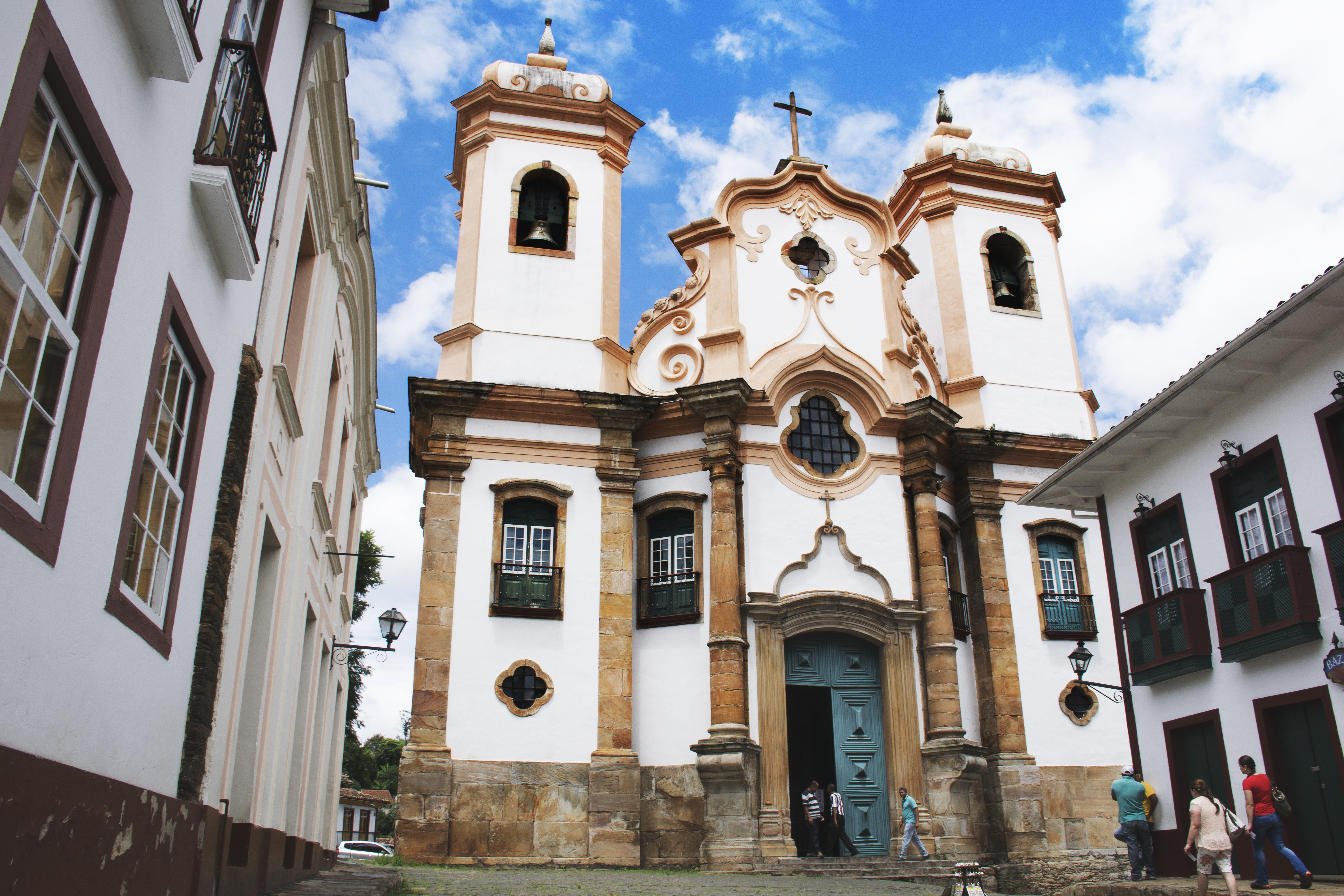 Igreja Matriz de Nossa Senhora do Pilar